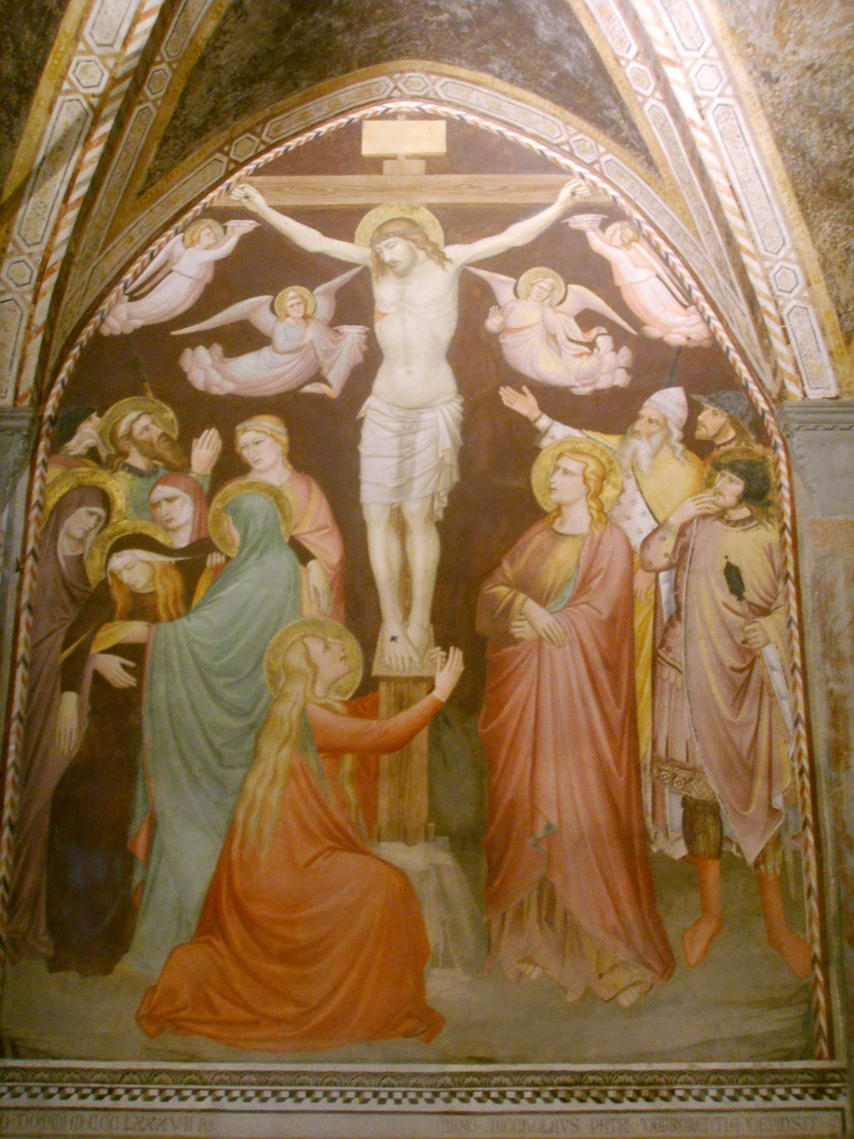 Chiesa di Santa Felìcita a Firenze, sala capitolare: Niccolò di Pietro Gerini, Crocifissione (1387).